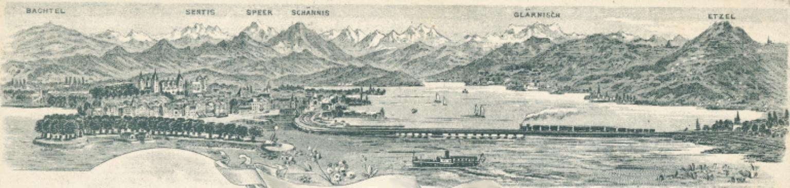 Rapperswil: Stadtansicht mit Seedamm samt Dampfzug und Bergen im Hintergrund: Bachtel, Säntis, Speer, Schännis, Glärnisch, EtzelAusschnitt aus einer Postkarte